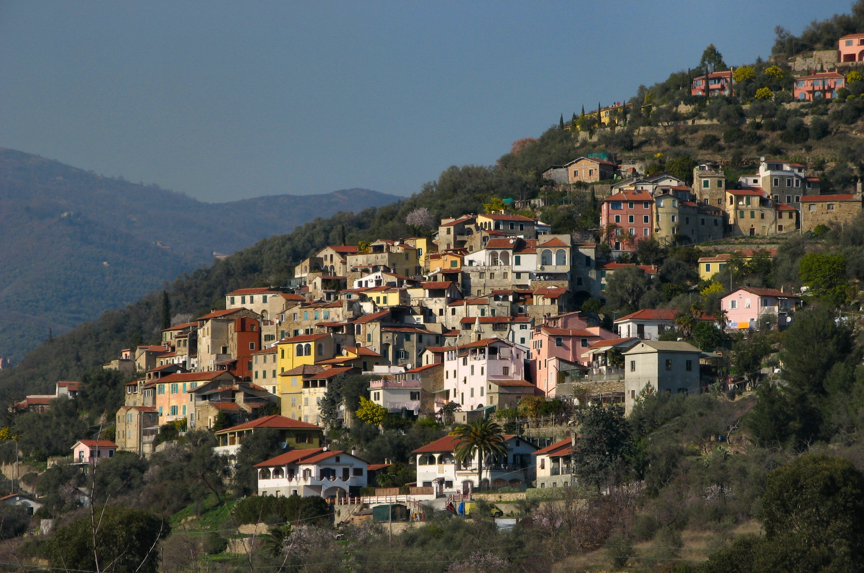 Isolalunga, frazione di Dolcedo, Imperia, Italy